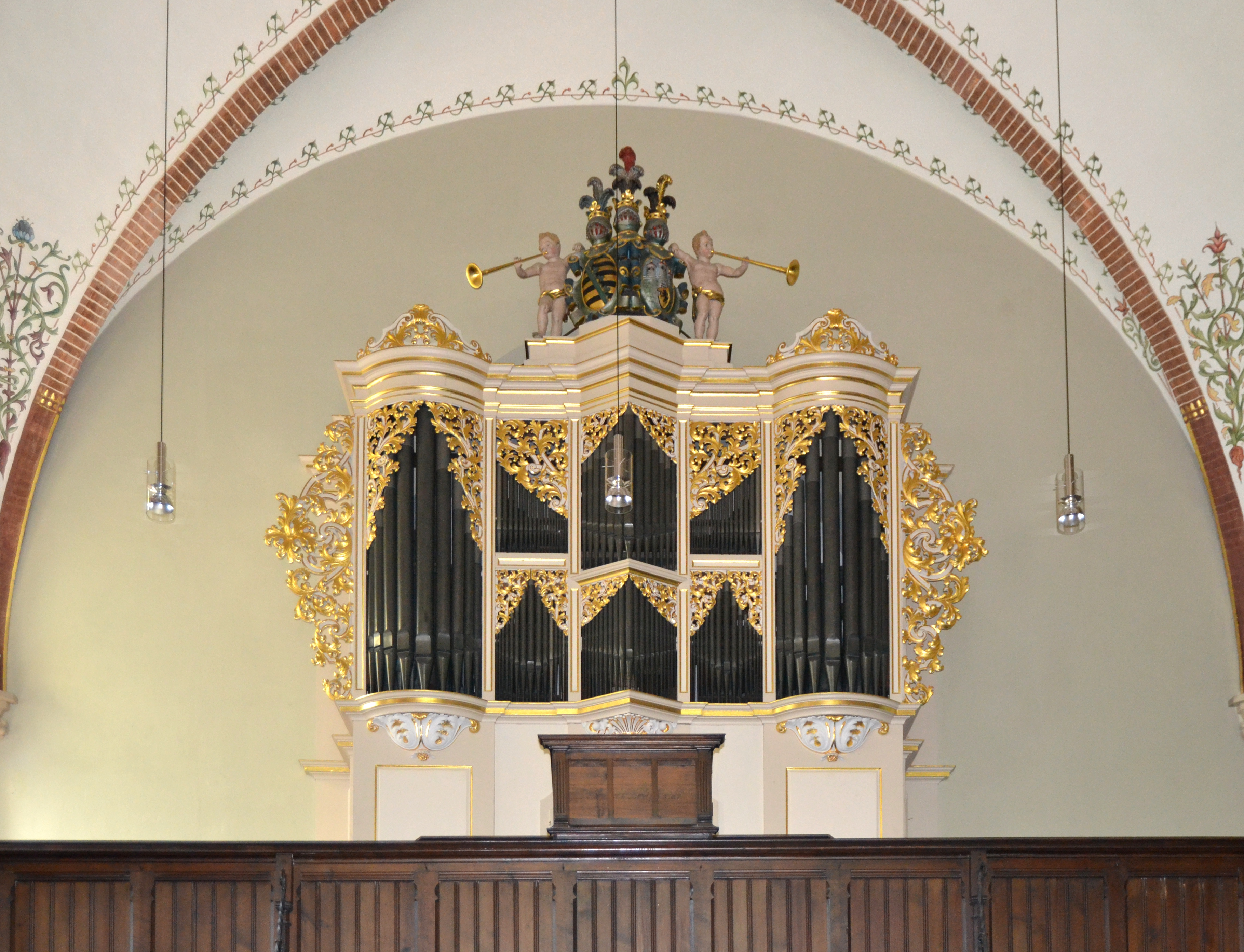 Orgel in der Jakobikirche Freiber, Sachsen, Deutschland (Bearbeitung: Lothar Spurzem